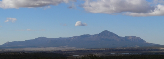 Smaller version of Sleeping_Ute.jpg